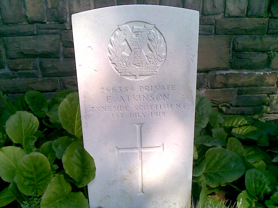 Soldatenfriedhof Niederzwehren-Grabstein